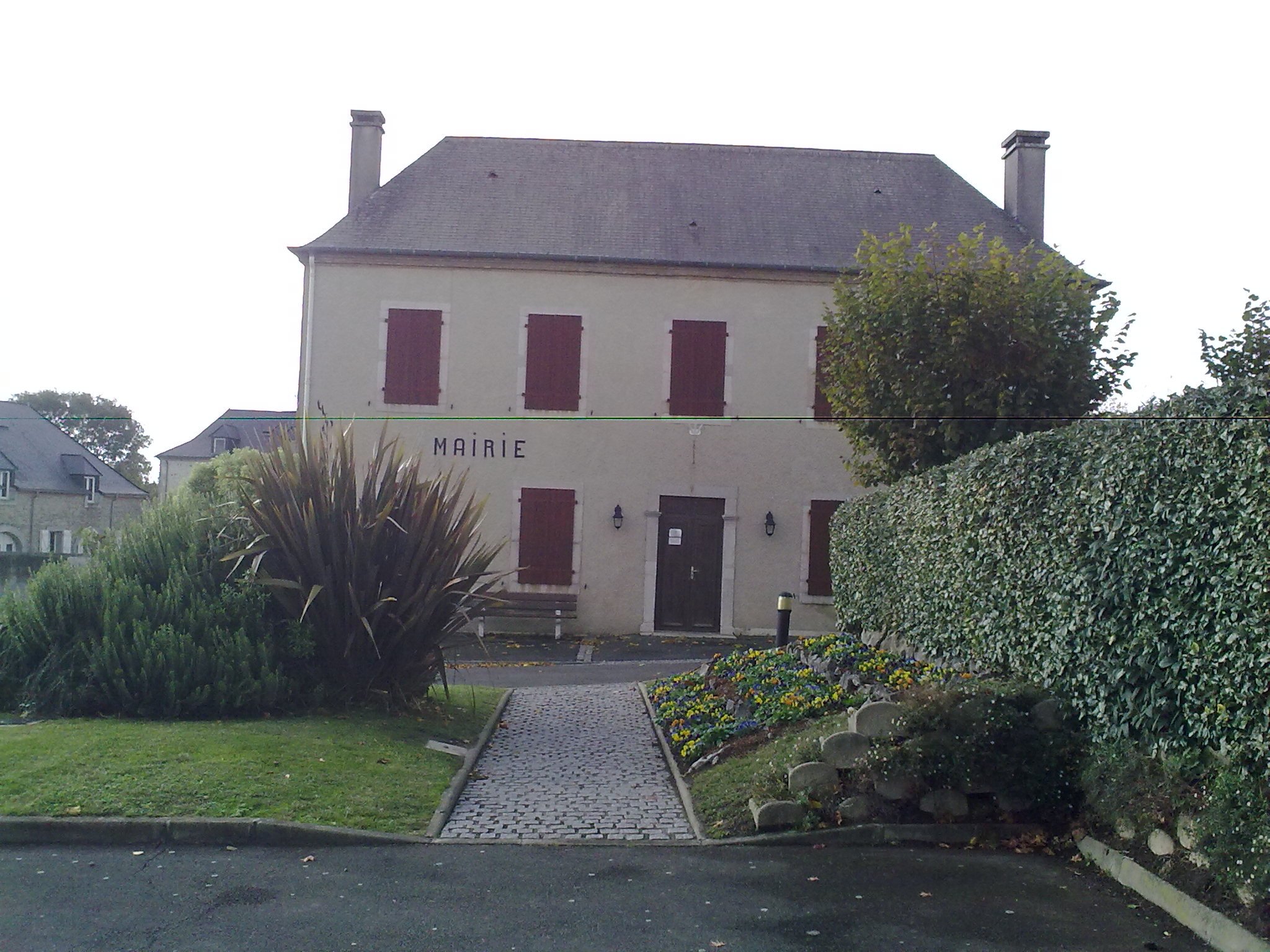 Casteide-Cami